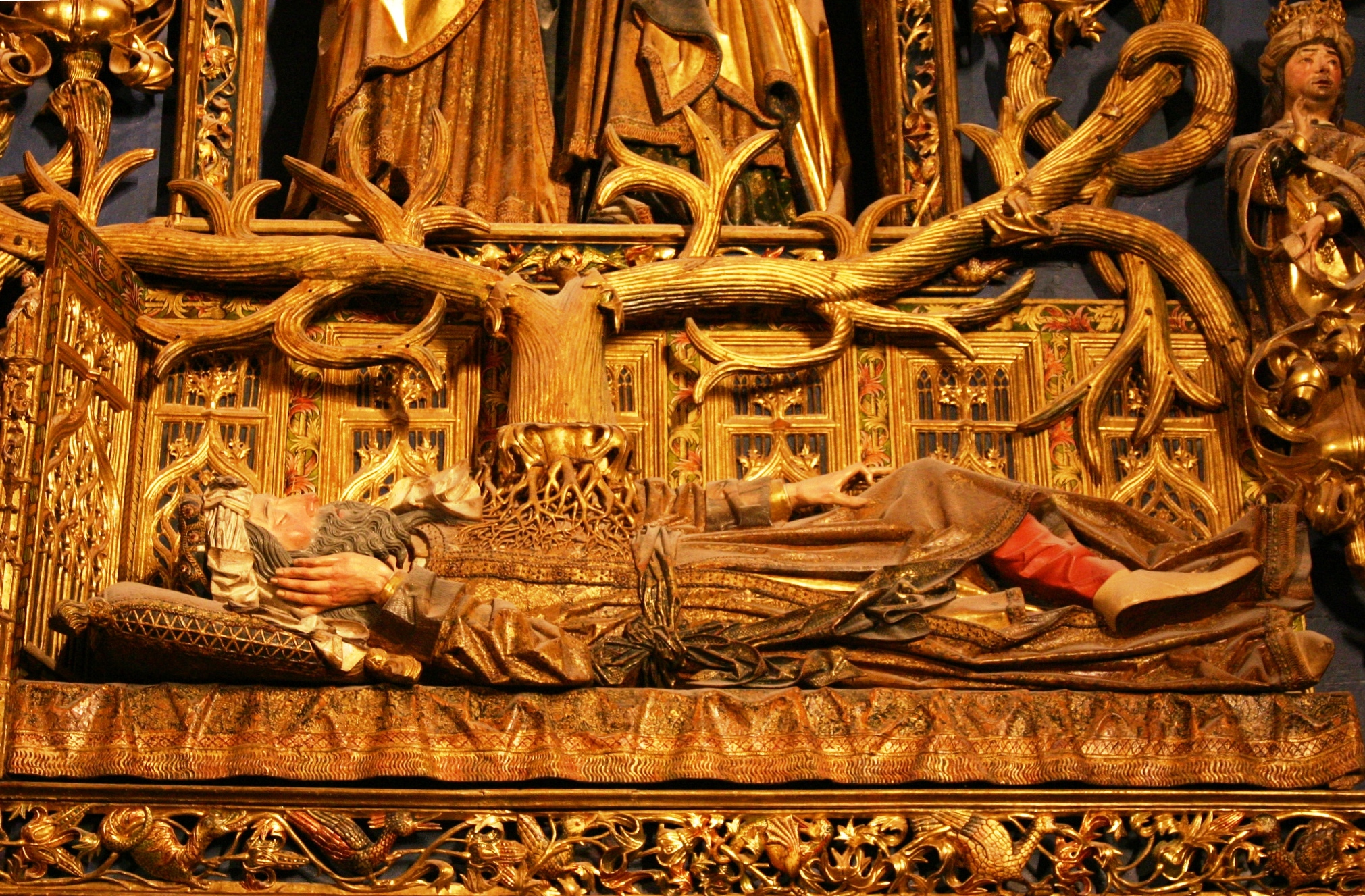 Interior da Catedral